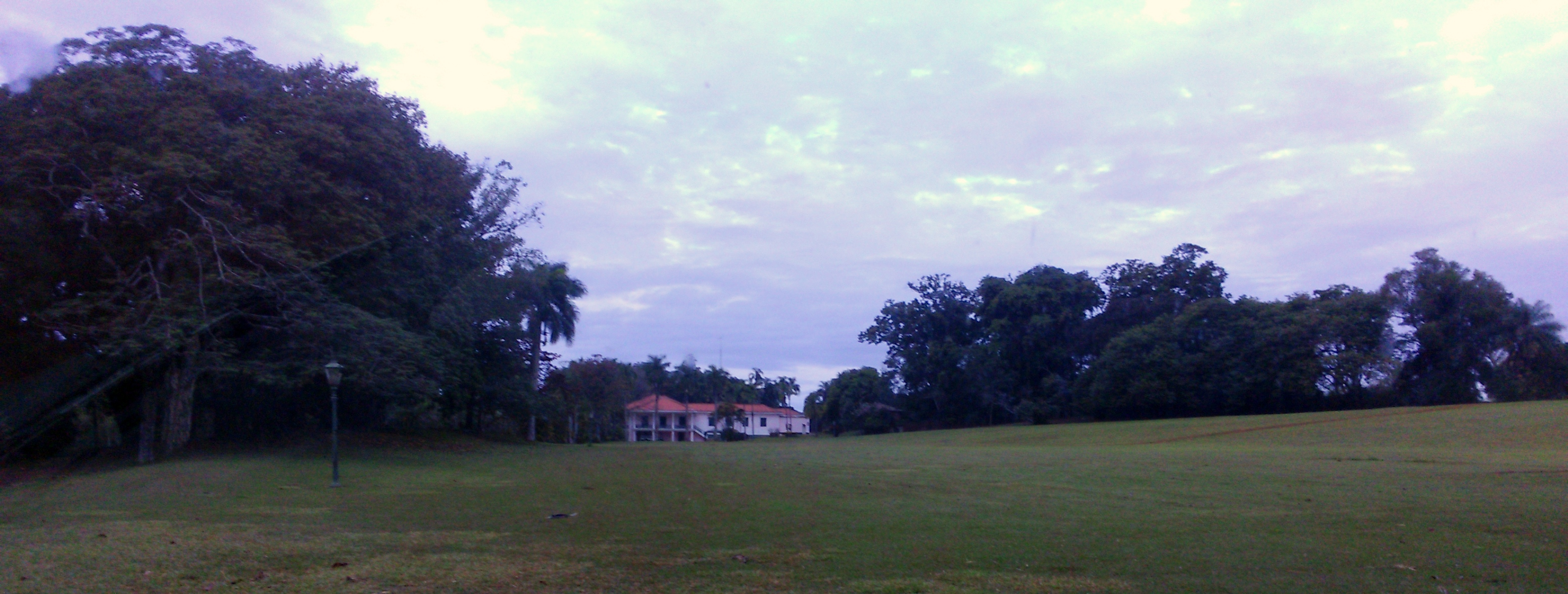 Casarão tombado pelo Conselho de Defesa do Patrimônio Cultural de Campinas (CONDEPACC) em 13 de novembro de 2003.